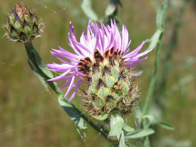 Rispen-Flockenblume Centaurea stoebe, Müritz-Gebiet